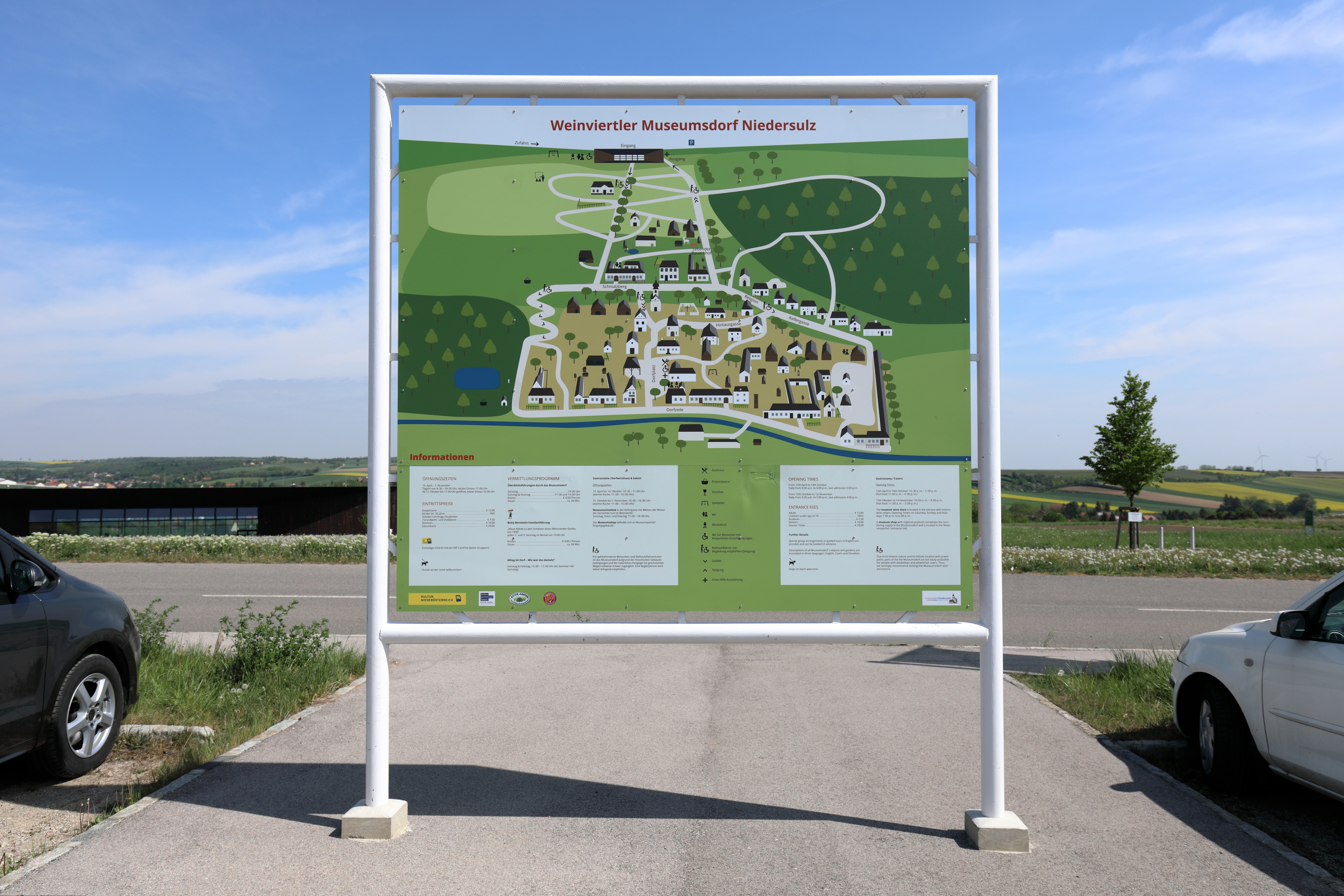 Infotafel (lesbar) beim Parkplatz des Museumsdorfes Niedersulz in der niederösterreichischen Marktgemeinde Sulz im Weinviertel. Anfang der 2010er Jahre wurde das größte Freilichtmuseum Niederösterreichs umgebaut und erweitert. Dabei wurde unter anderem der Eingangsbereich verlegt, ein Besucherzentrum bzw. MuseumsPortal errichtet, ein neuer Parkplatz gebaut und am 16. Mai 2012 eröffnet.